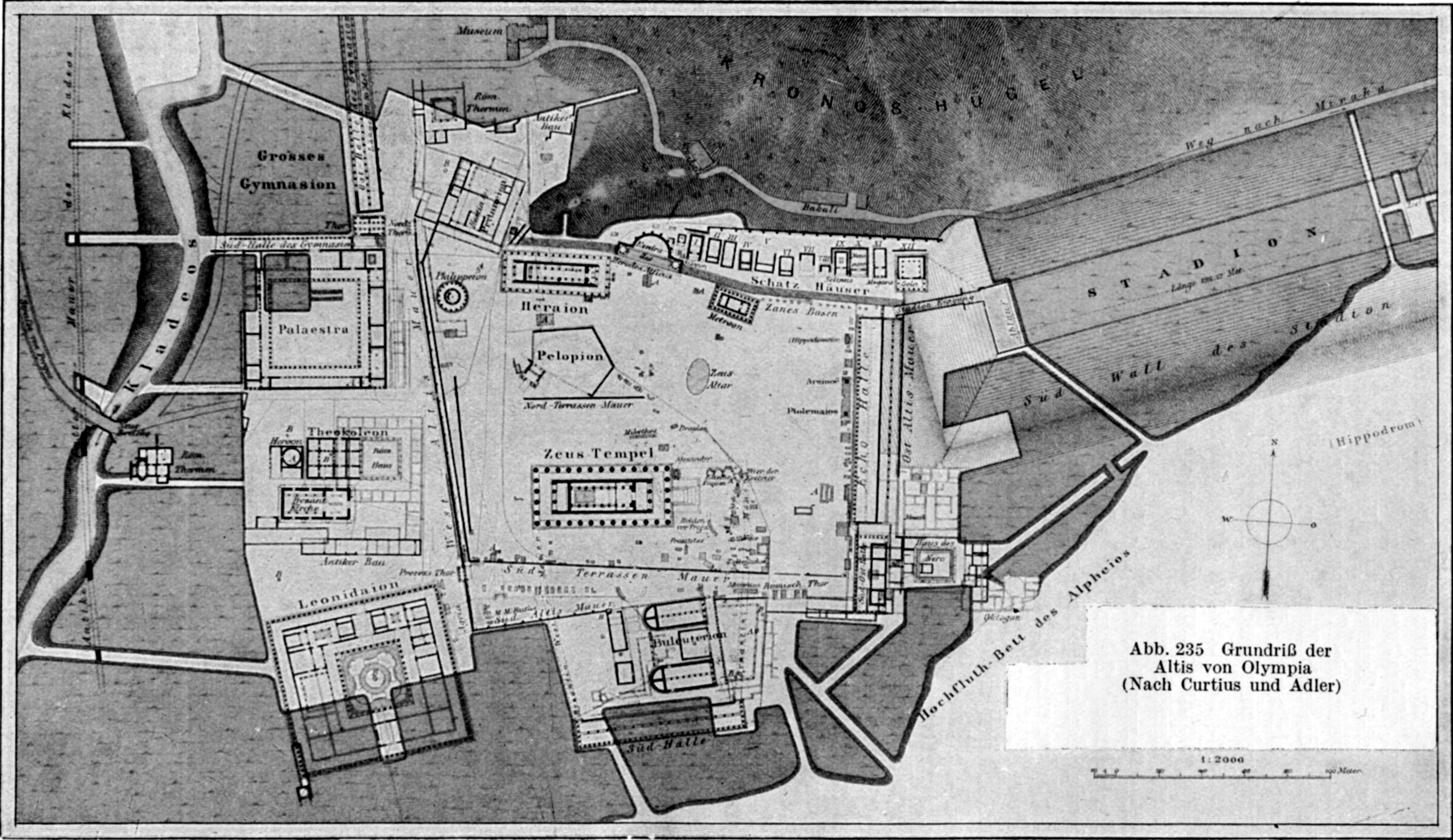 Grundriss der Altis von Olympia. Quelle: Wilhelm Lübke, Max Semrau: Grundriß der Kunstgeschichte. Paul Neff Verlag, Esslingen, 14. Auflage 1908. griechisch